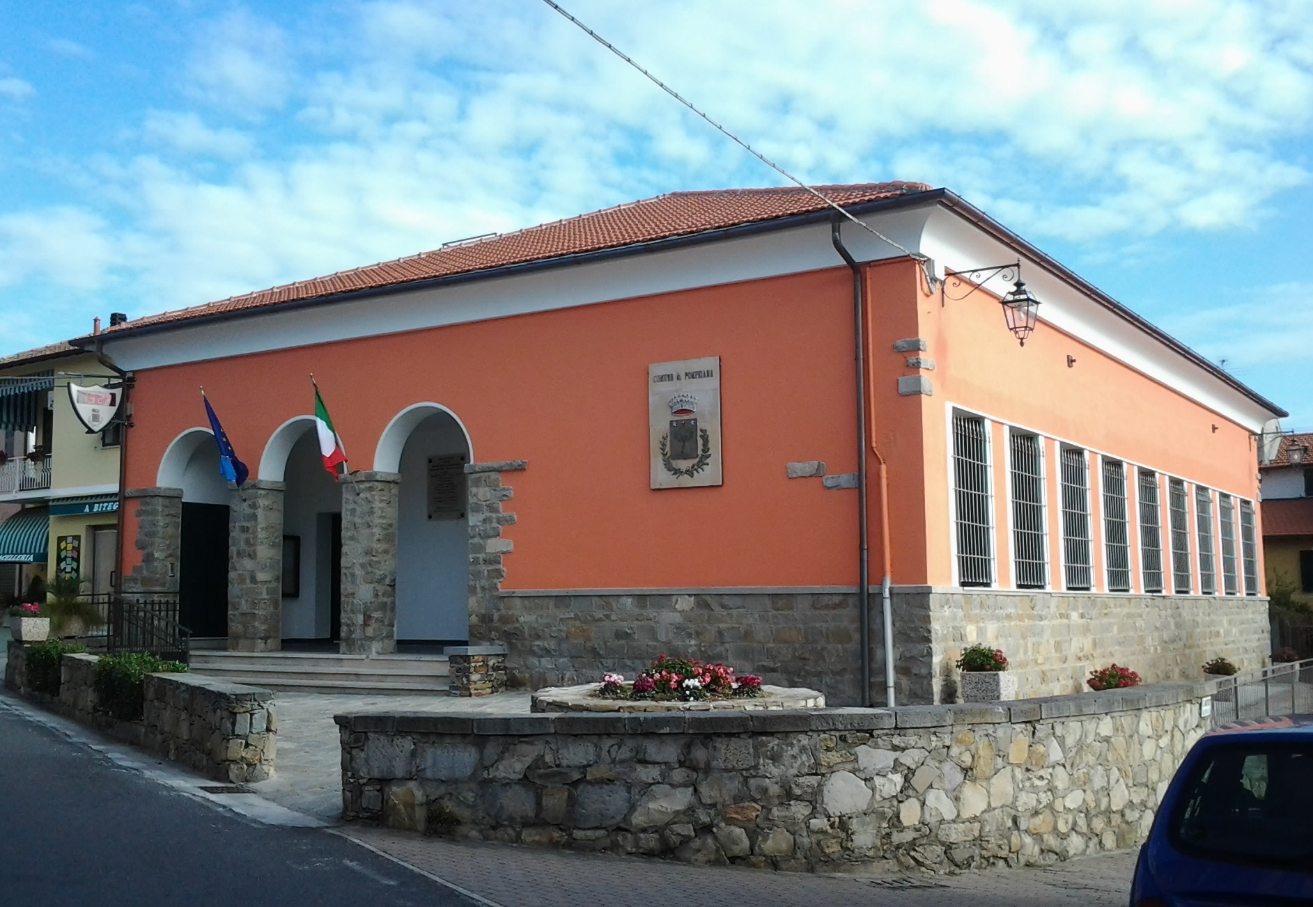 Municipio del comune di Pompeiana (IM). Novembre 2013, poco dopo il termine dei lavori di messa a norma antisismica e di restauro. Da notare che il piano superiore è stato completamente demolito rispetto alla struttura precedente.